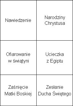 opis pól dawnego ołtarza głównego kościoła św. Jana w Stargardzie Szczecińskim.